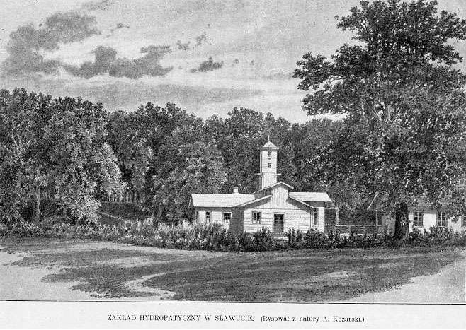 Гідропатичний заклад (санаторій) Сангушків у Славуті, поч. 1870-х